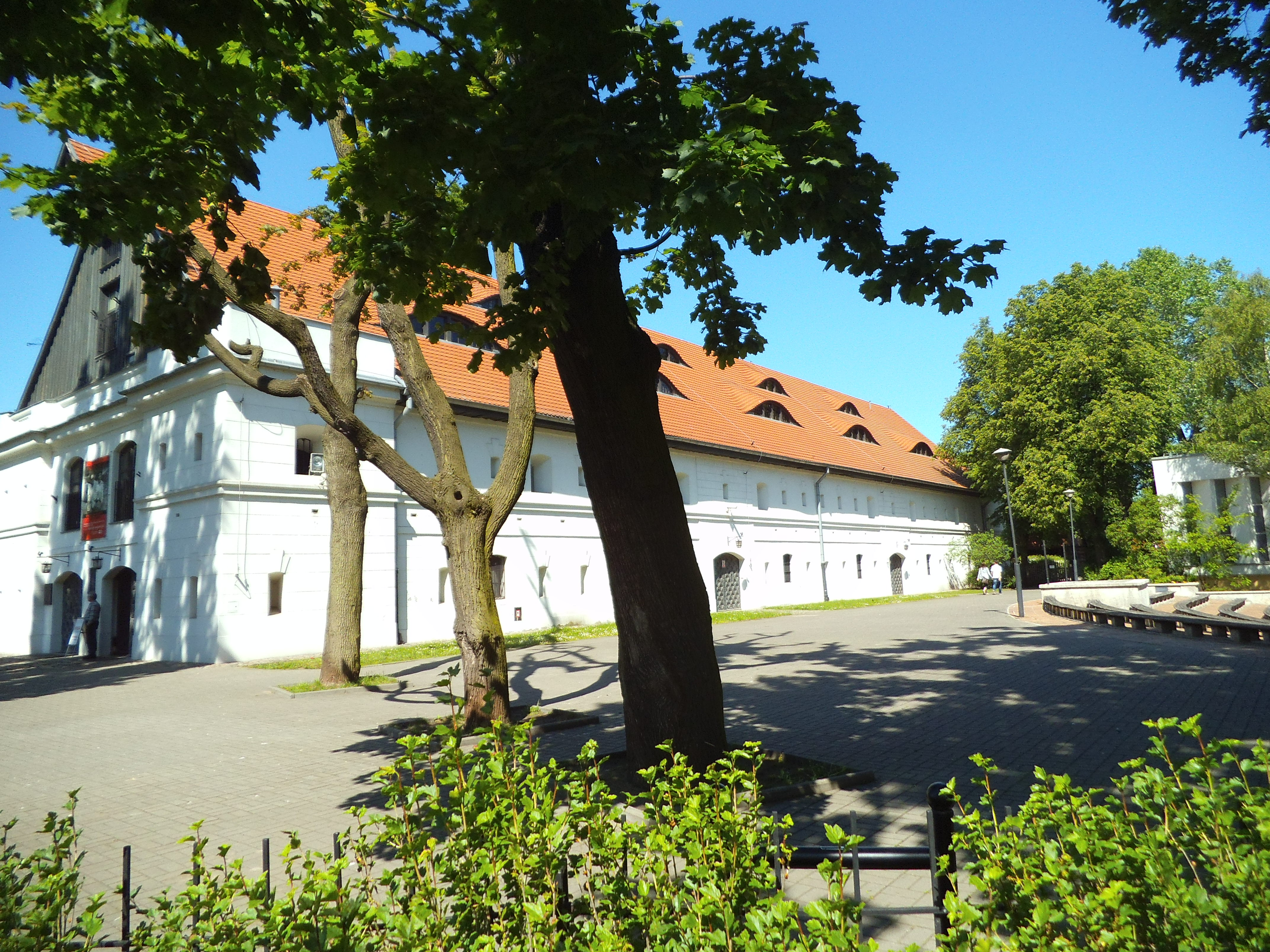 Muzeum Etnograficzne w Toruniu